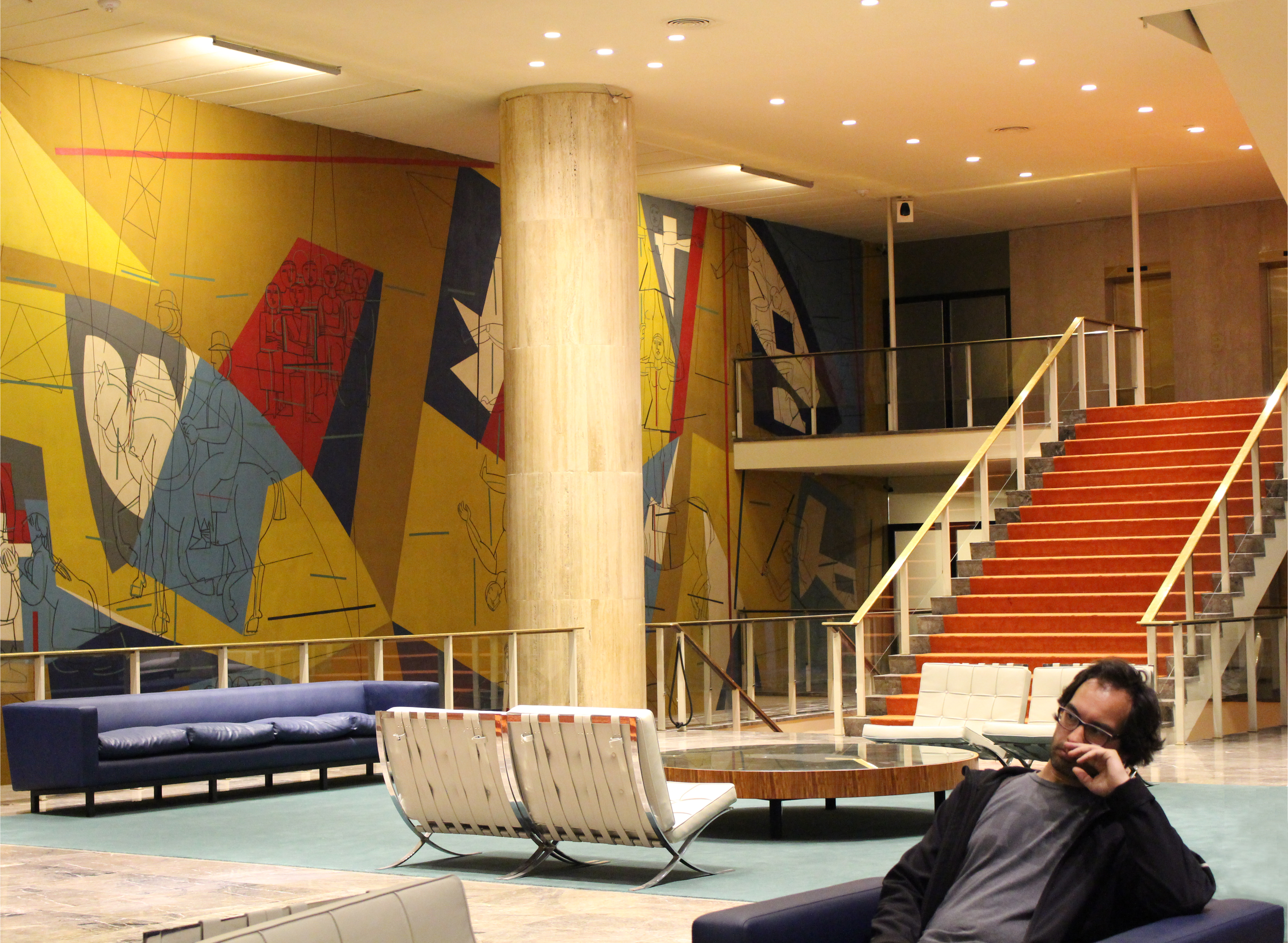 Edificio: Teatro Municipal General San Martín